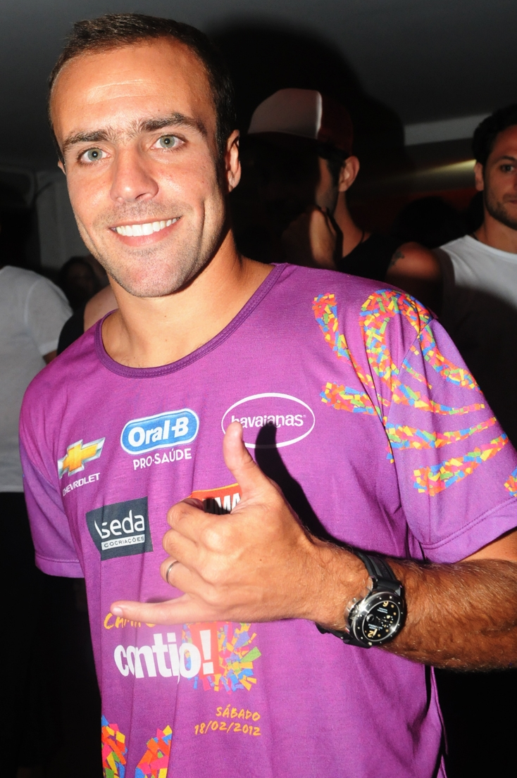 Roger Flores no Carnaval de 2012.